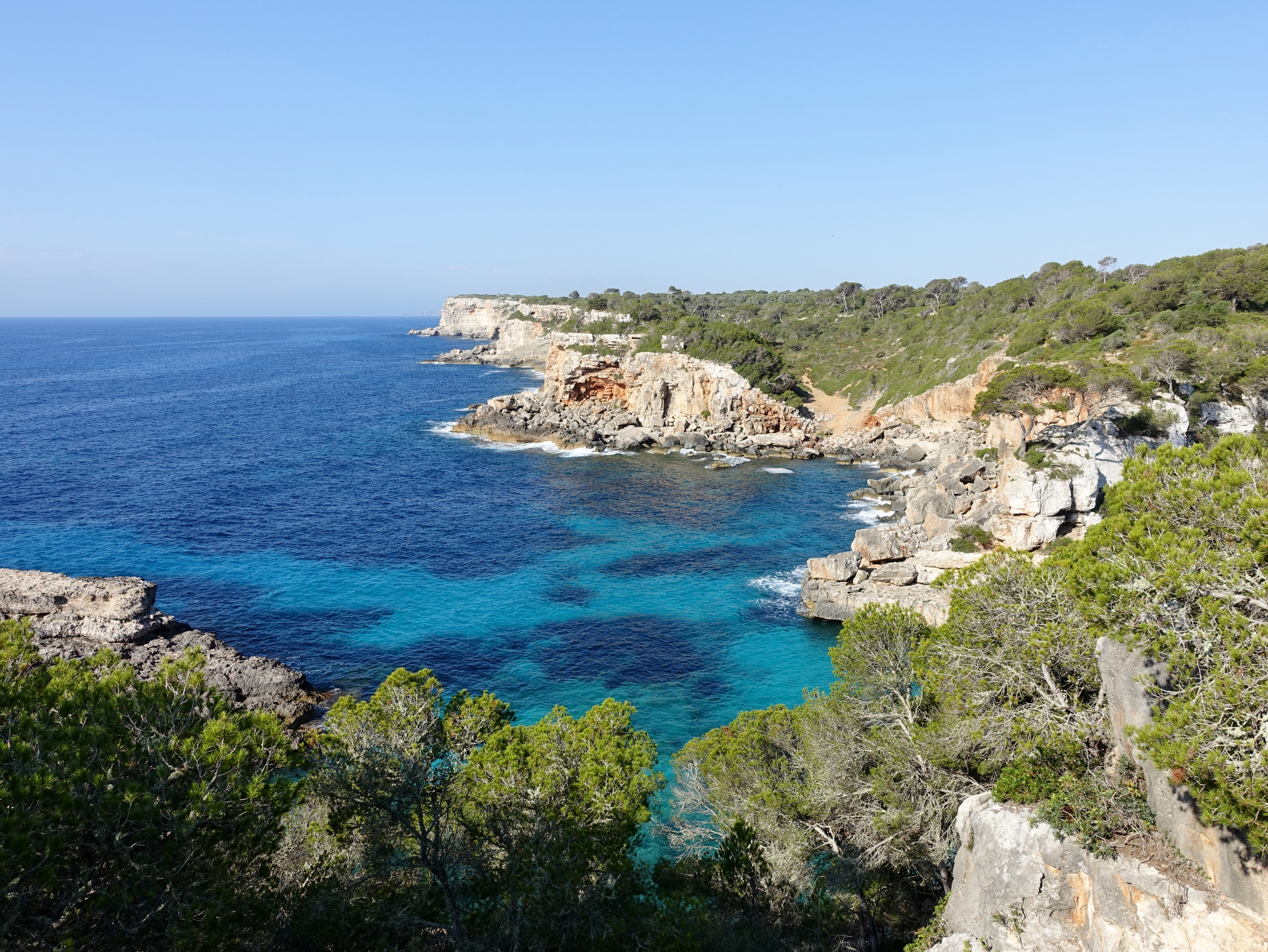 Cala s’Almunia, Gemeinde Santanyí, Mallorca, Spanien